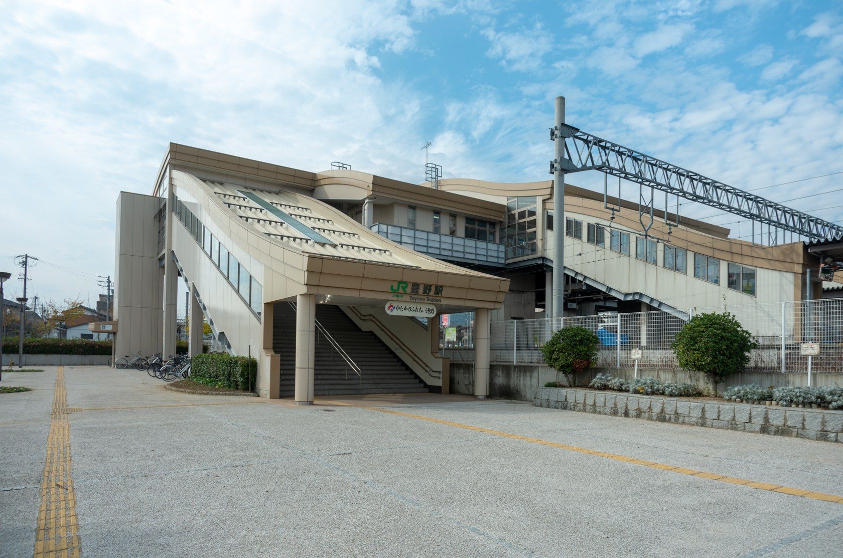 東日本旅客鉄道株式会社飯山線、しなの鉄道株式会社北しなの線豊野駅駅舎